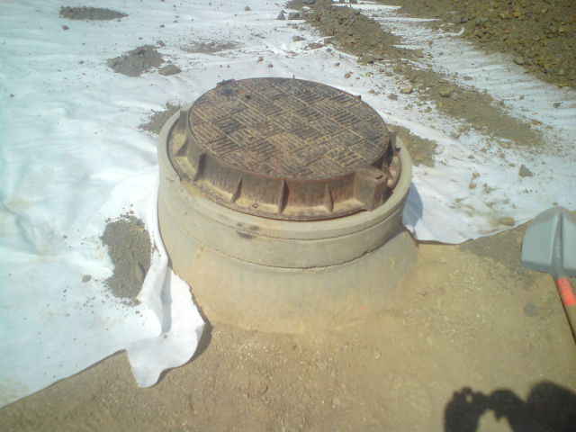 Jímka